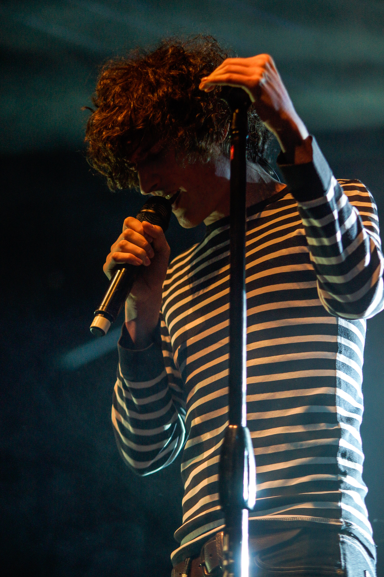 Dawid Podsiadło z zespołem podczas Rocket Festiwal 2014 w Warszawie.